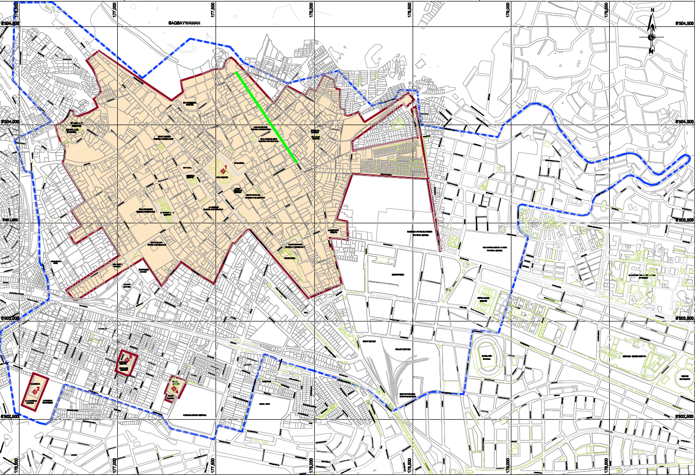 Trazo de la calle Choquechaka en la ciudad del Cusco